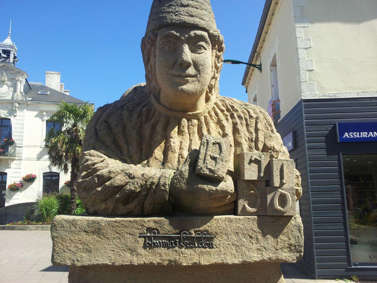 Statue de Jean Brito à Pipriac